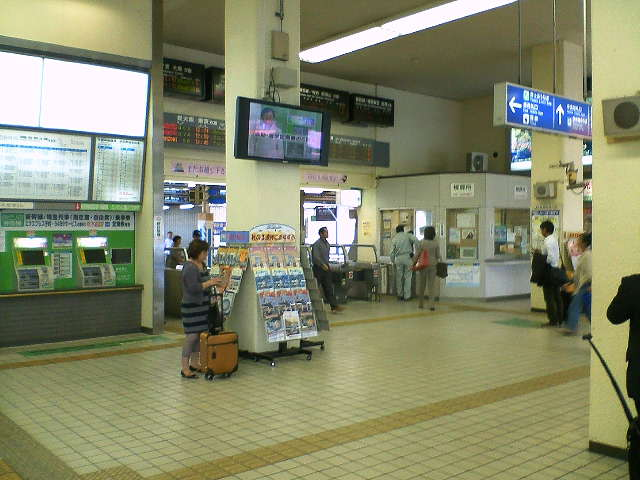 JR姫路駅北中央改札口。